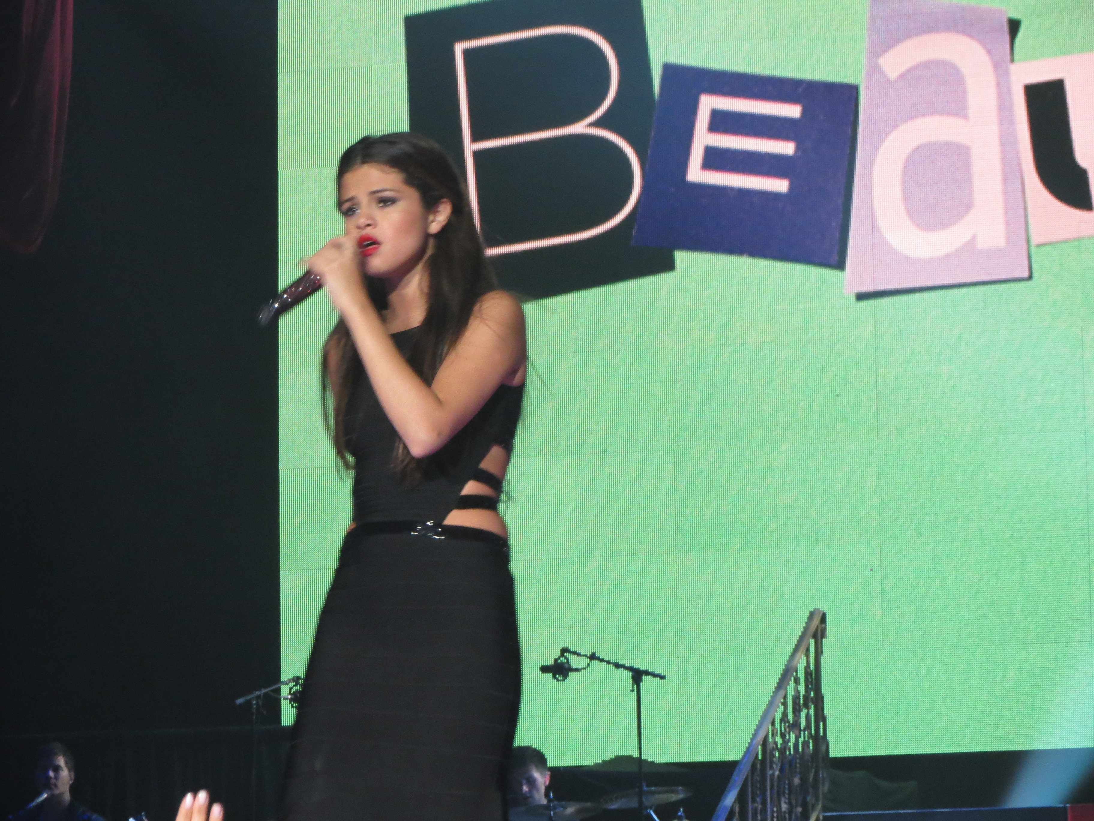 Selena Gomez StarsDance Nov 2013 San Diego, CA